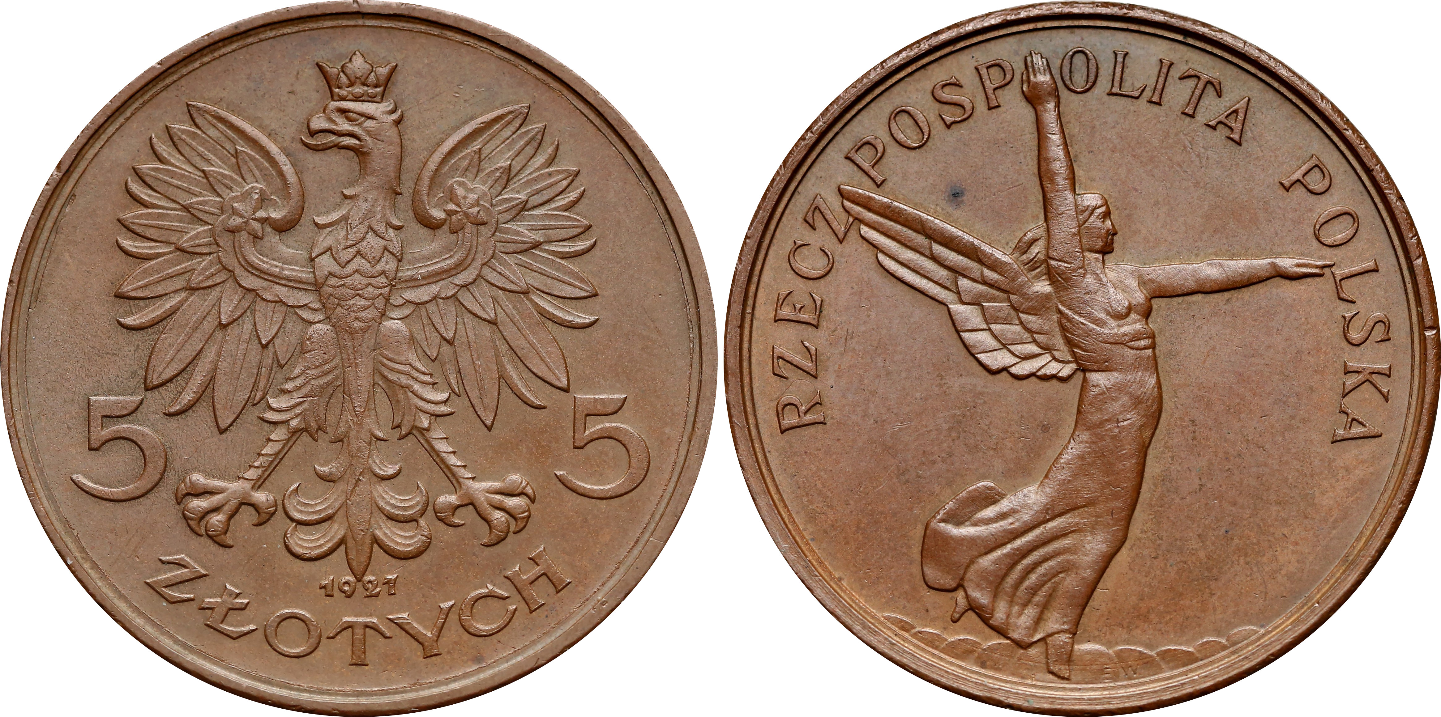 PRÓBA 5 złotych 1927 Nike brąz